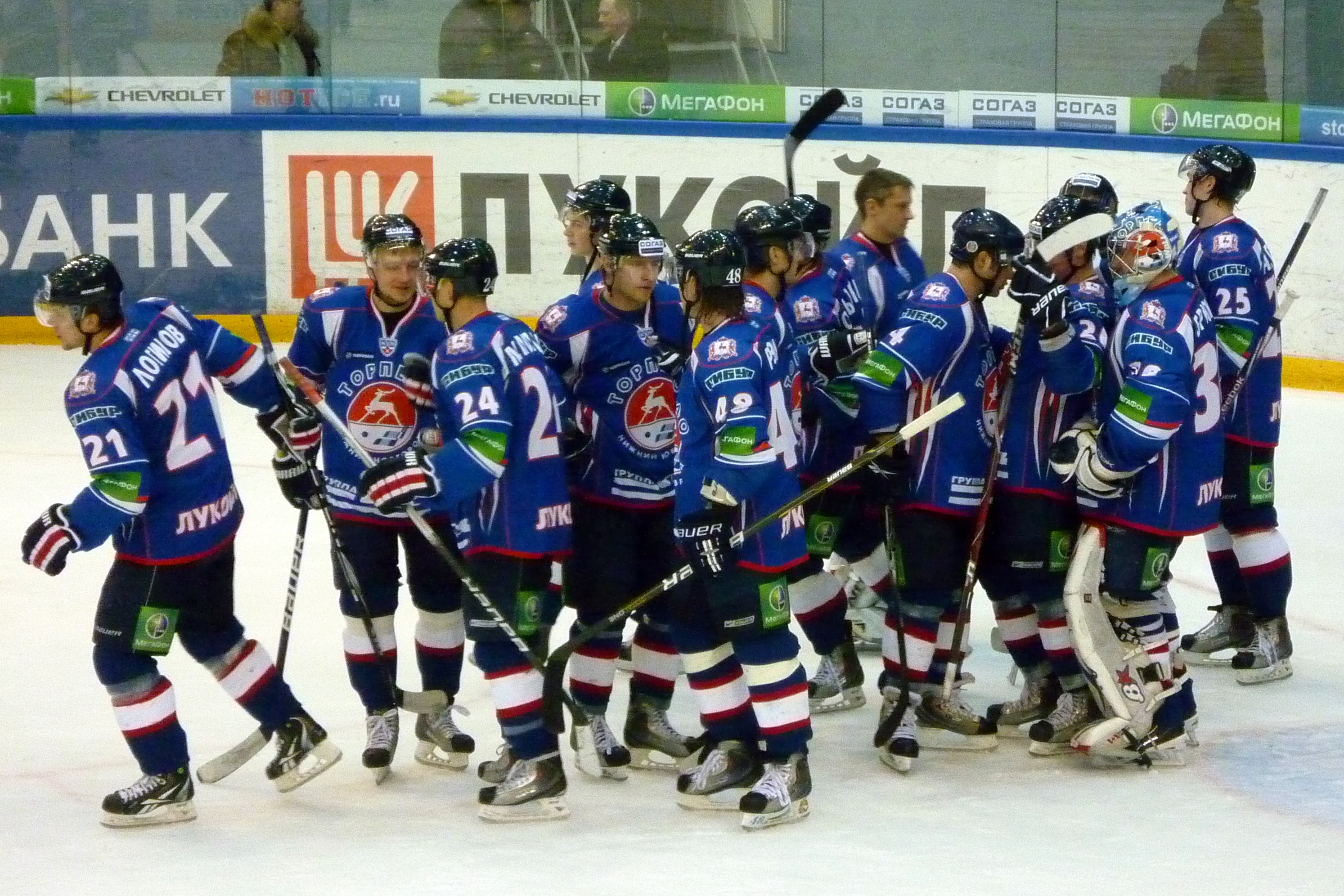 Игроки нижегородского «Торпедо» празднуют победу над питерским СКА в матче 12 декабря 2010 года